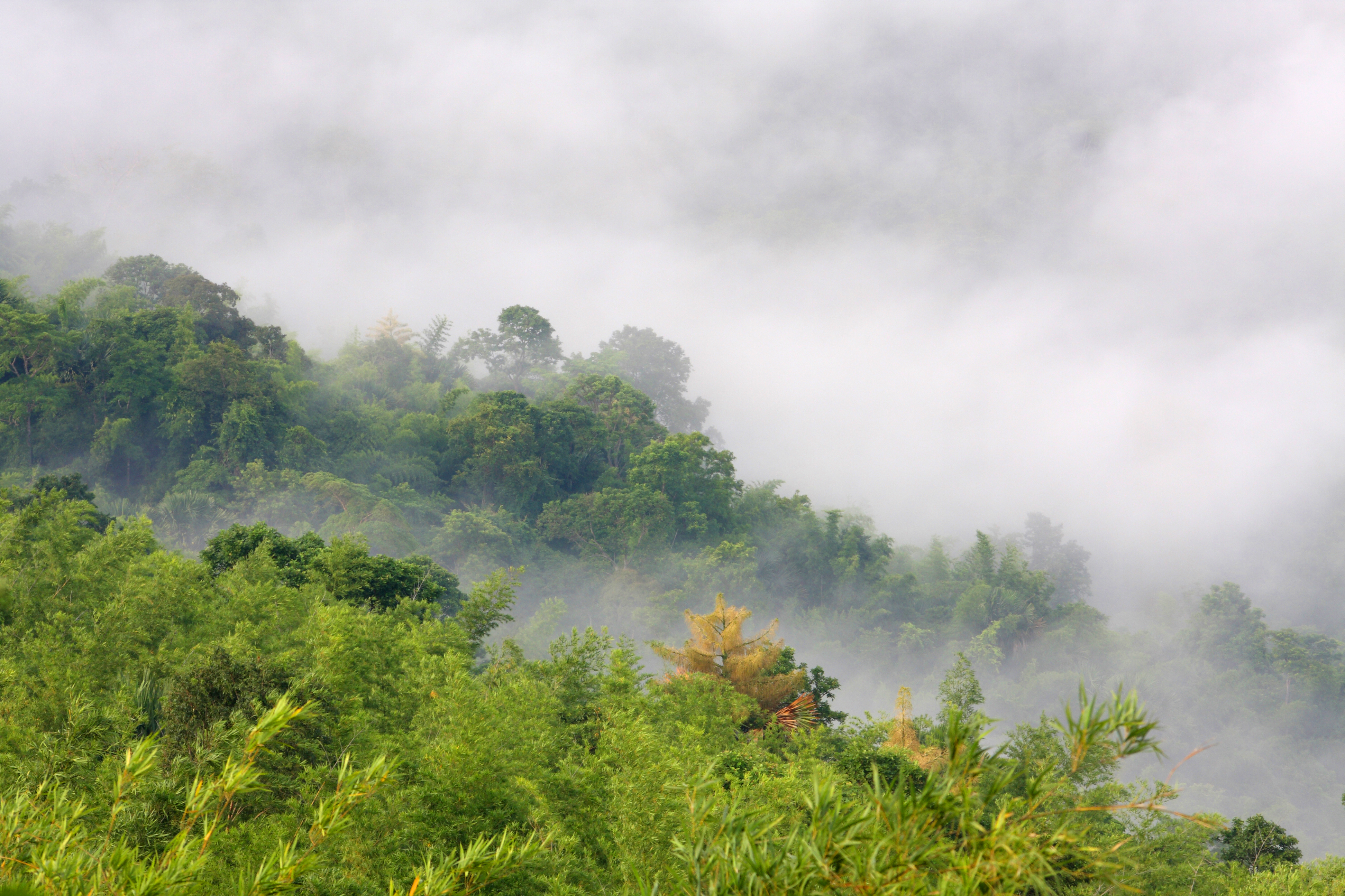 อุทยานแห่งชาติทับลาน เป็นอุทยานแห่งชาติในภาคอีสาน มีพื้นที่ครอบคลุมท้องที่อำเภอปักธงชัย อำเภอวังน้ำเขียว อำเภอครบุรี อำเภอเสิงสาง จังหวัดนครราชสีมา และอำเภอนาดี จังหวัดปราจีนบุรี สภาพป่ามีความอุดมสมบูรณ์และมีป่าลาน ซึ่งหาดูได้ยากที่มีเฉพาะบางท้องที่เท่านั้น มีต้นลานขึ้นตามธรรมชาติ เป็นแหล่งกำเนิดของแม่น้ำ ลำธารต่างๆ และมีธรรมชาติที่สวยงาม เช่น หุบผา หน้าผา น้ำตก เมื่อวันที่ 14 กรกฎาคม พ.ศ. 2548 อุทยานแห่งชาติเขาใหญ่ ทับลาน ปางสีดา ตาพระยา และเขตรักษาพันธุ์สัตว์ป่าดงใหญ่ ได้รับการประกาศให้เป็น "มรดกโลกทางธรรมชาติ" จากองค์การยูเนสโก ภายใต้ชื่อกลุ่ม "ดงพญาเย็น-เขาใหญ่"